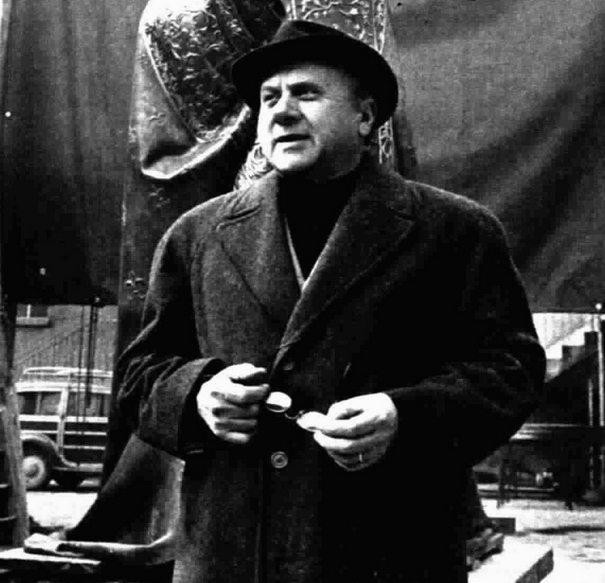 Italian sculptor Francesco Messina